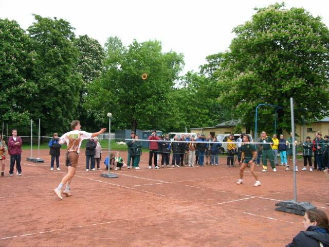 Endpiel der Herren beim International Masters 2002